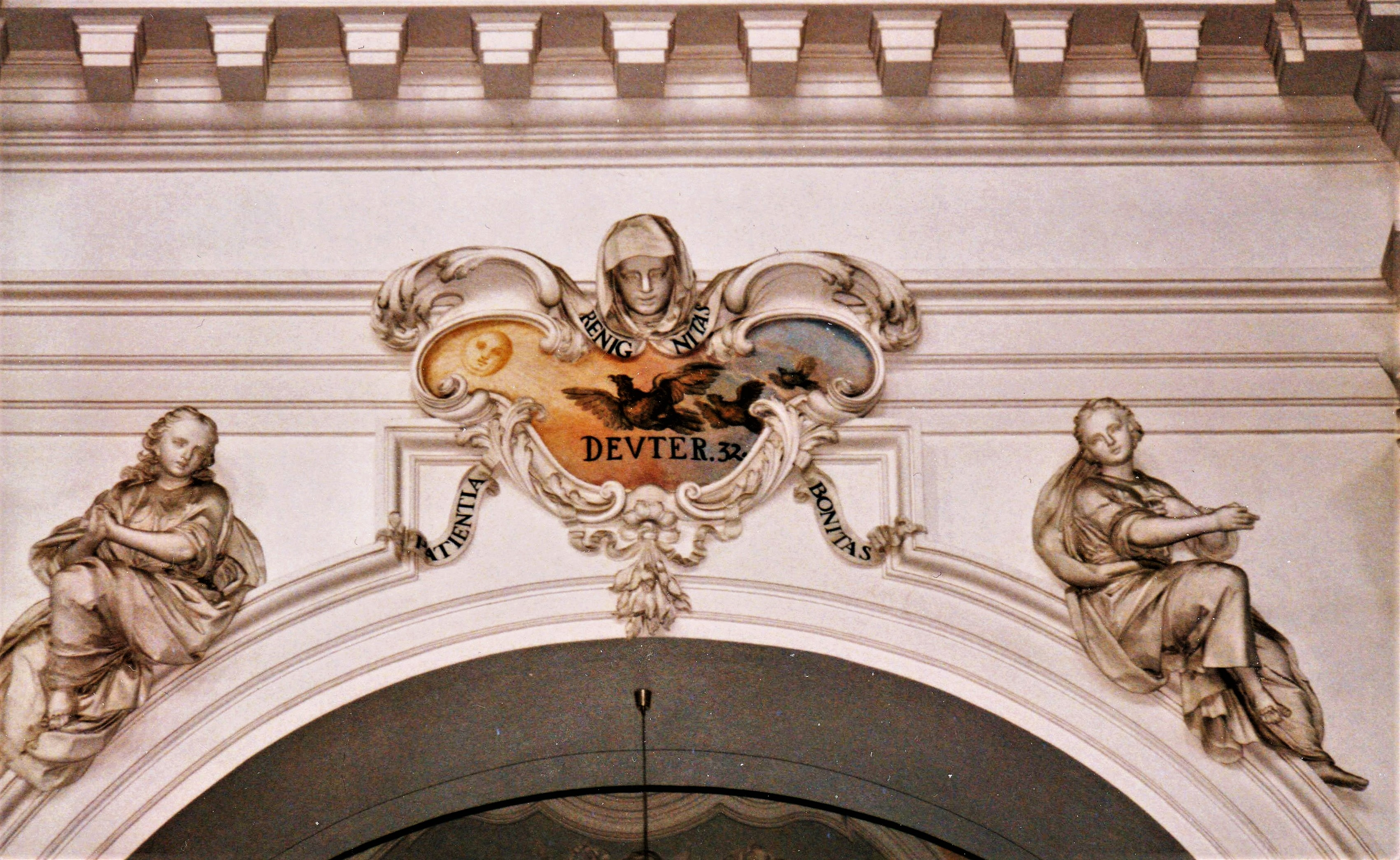 Dom St. Salvator (Fulda), über den Arkadenbögen Gruppe der 12 Früchte des Geistes, Nordseite (um 1712): Patientia (Geduld) - Benignitas (Milde) - Bonitas (Güte)